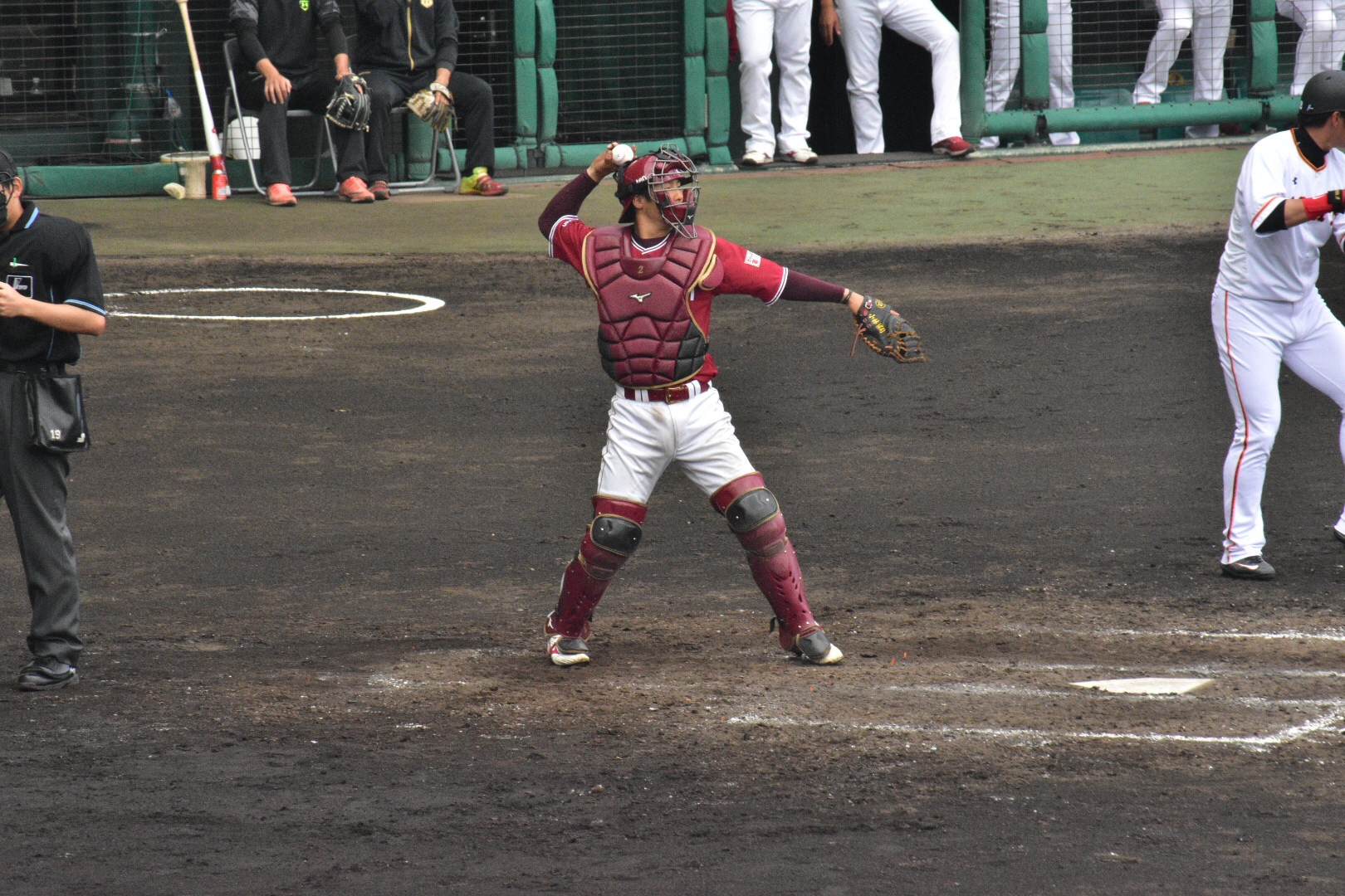 2019年2月23日、セルラースタジアム那覇にて撮影。